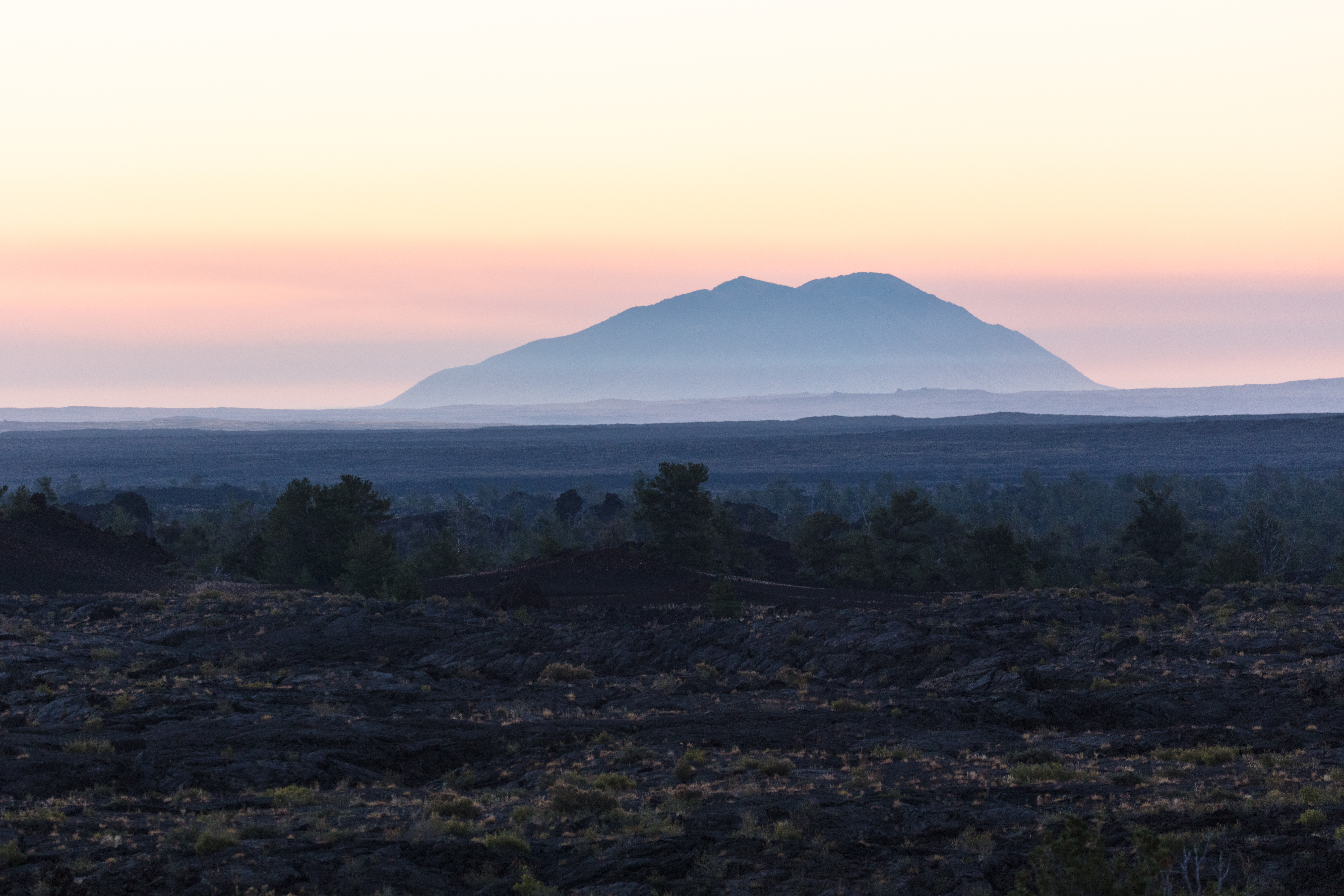 NPS / Jacob W. Frank